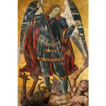 Cristoforo Faffeo - San Michele Arcangelo Olio e oro su tavola; cm 200 x 134 fine secolo XV Museo Diocesano Napoli DonnaRegina